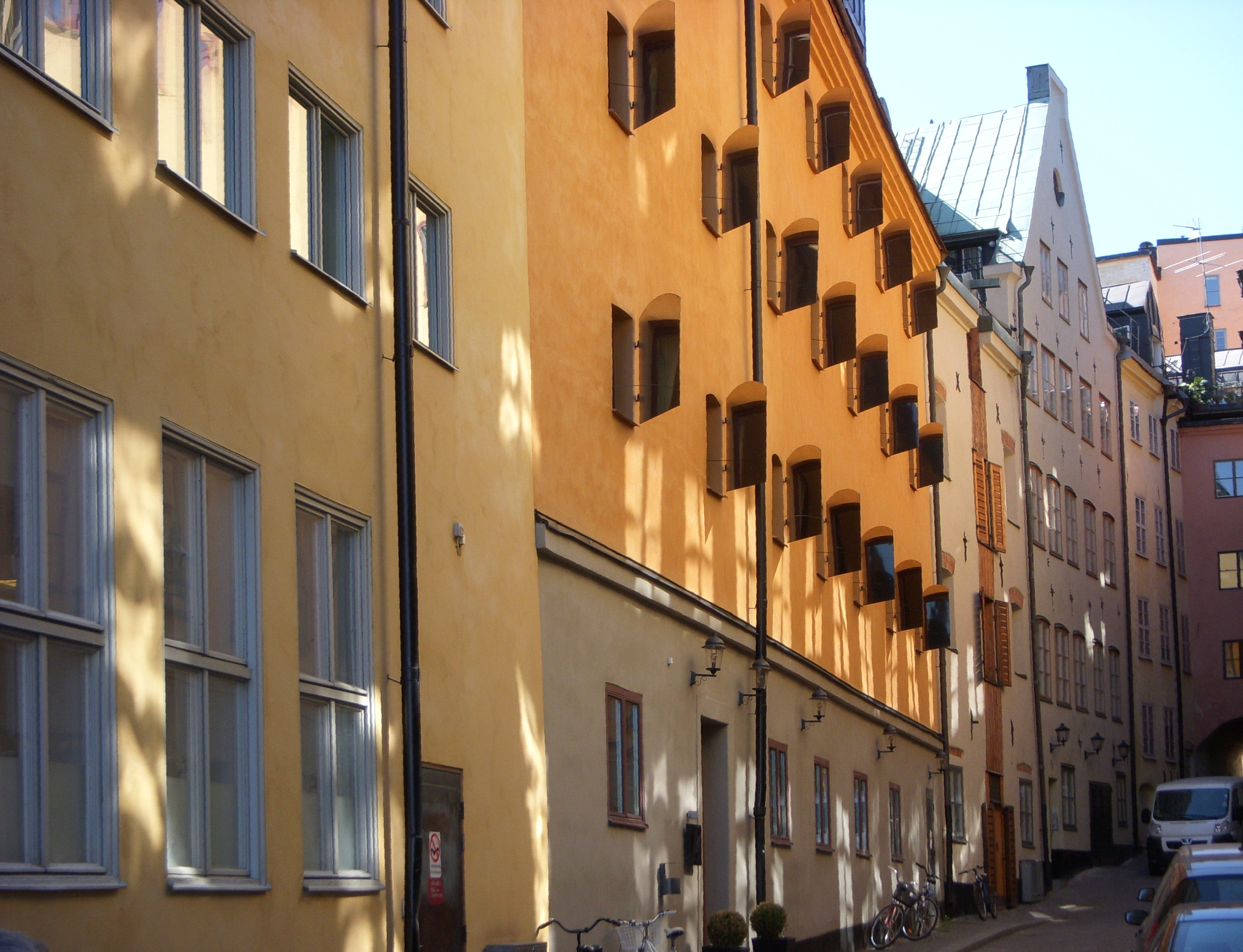 Hotell Reisen, fasad mot Bredgränd, Gamla stan, Stockholm